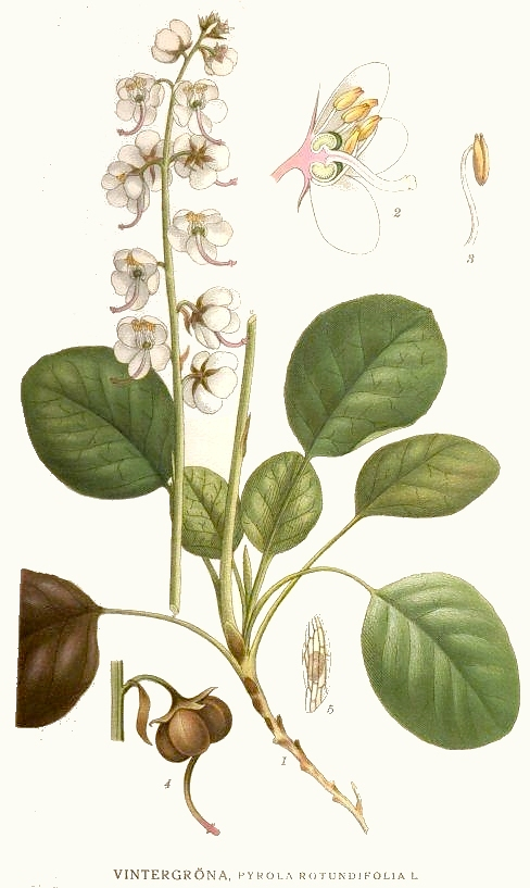 Original Description Vintergröna, Pyrola rotundifolia L.